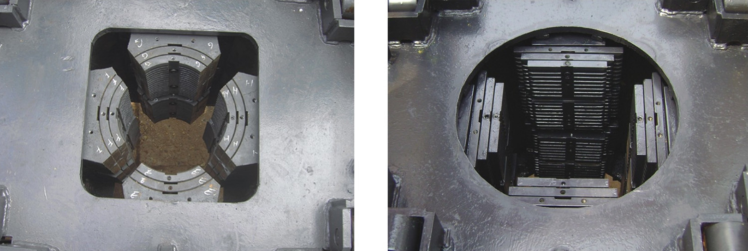 Узел зажима сваи